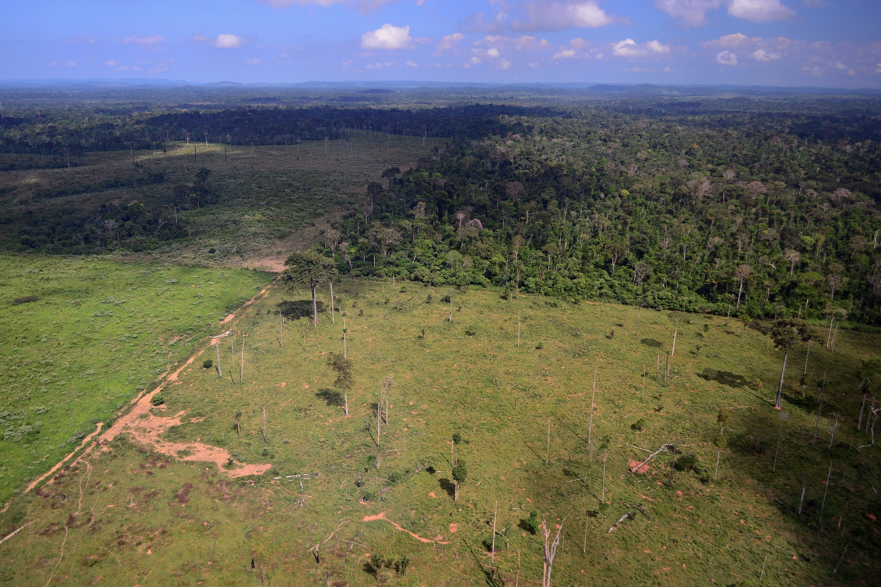 Sobrevoo aponta os limites entre a floresta e as pastagens em Novo Progresso, Pará. Foto: Vinícius Mendonça - Ascom/Ibama.